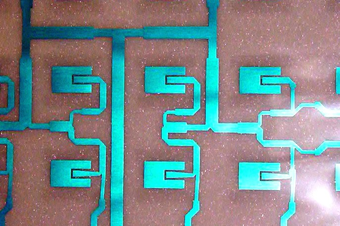 Streifenleitungen zur impedanz- und laufzeitangepassten Speisung der Strahlerelemente einer Flachantenne für TV-Satellitenempfang